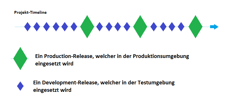 Hier werden die unterschiedlichen Releases, die beim Agile Unified Process auftreten können, dargestellt